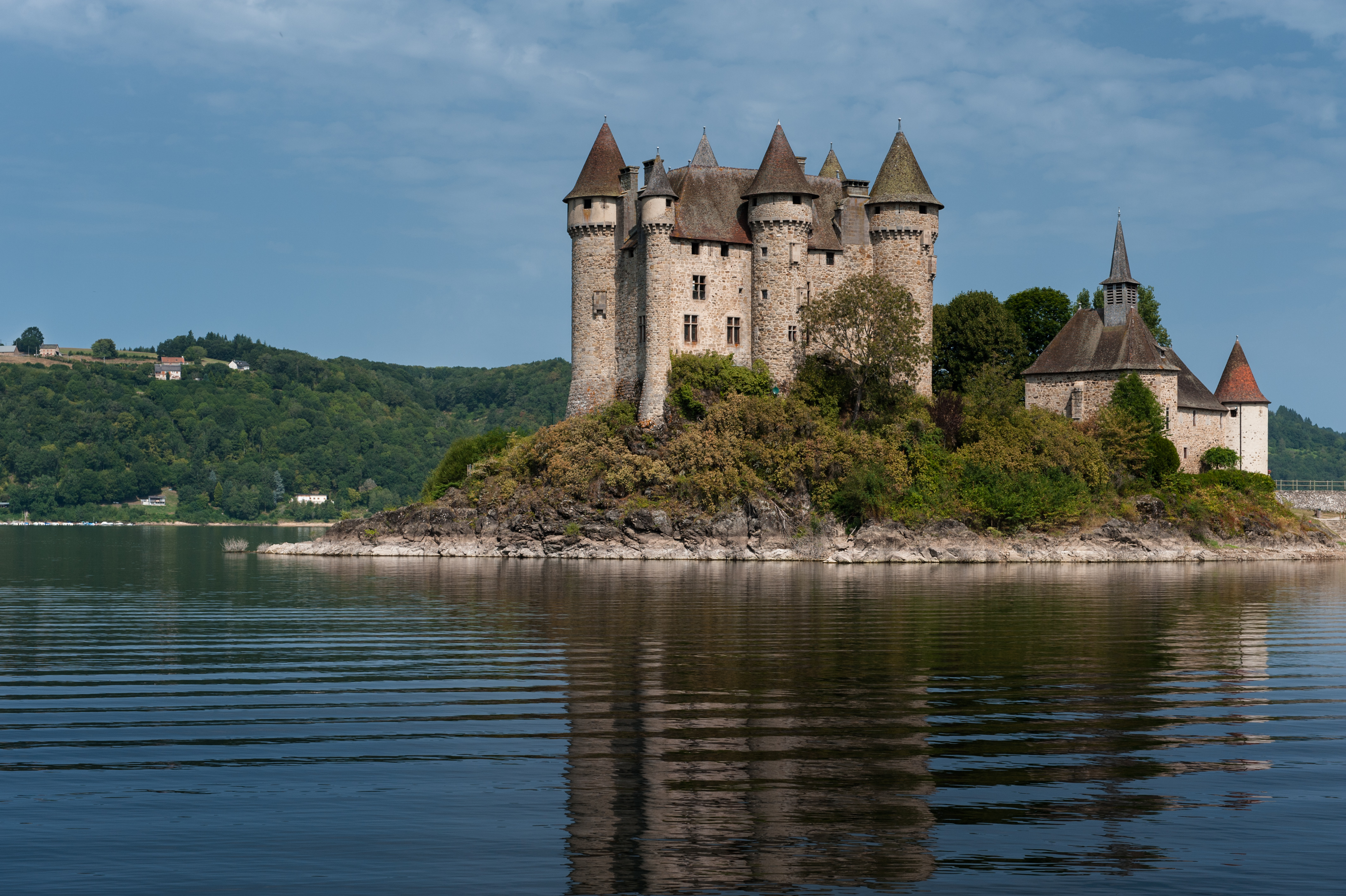 Chateau de Val